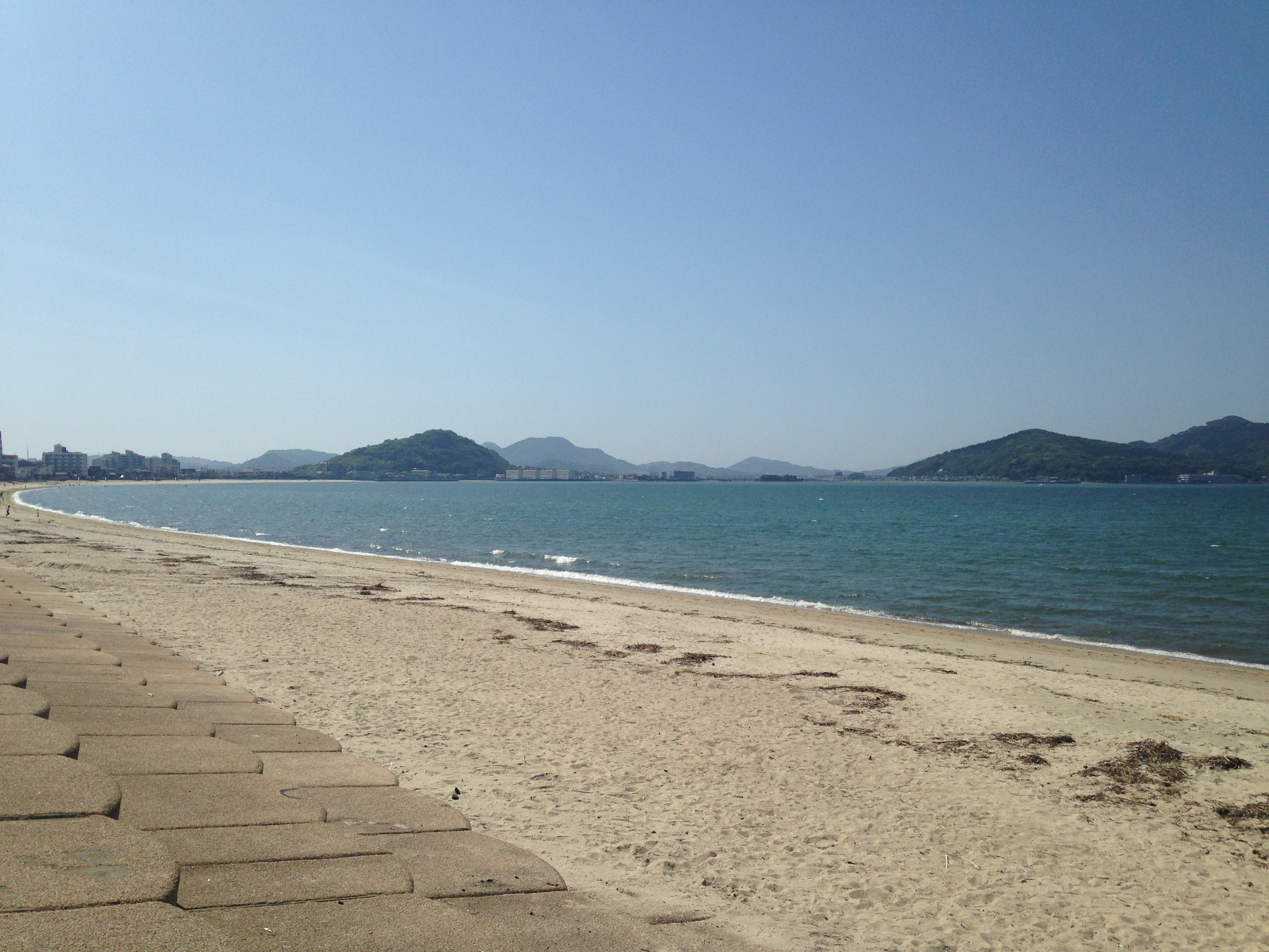 長垂海浜公園より望む博多湾(今津方面)